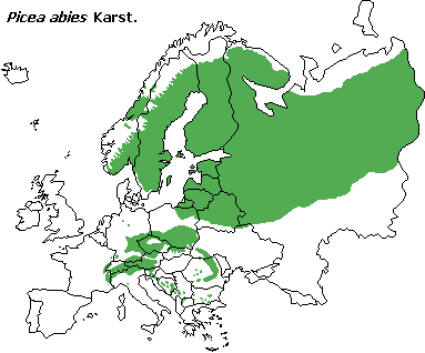 Range of Picea abies Karst. (répartition de l'épicéa commun)